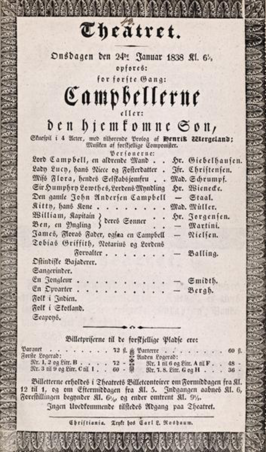 Anündigung des Theaterstücks „Campbellerne“ von Henrik Wergeland. Erste Aufführung in norwegischer Sprache.